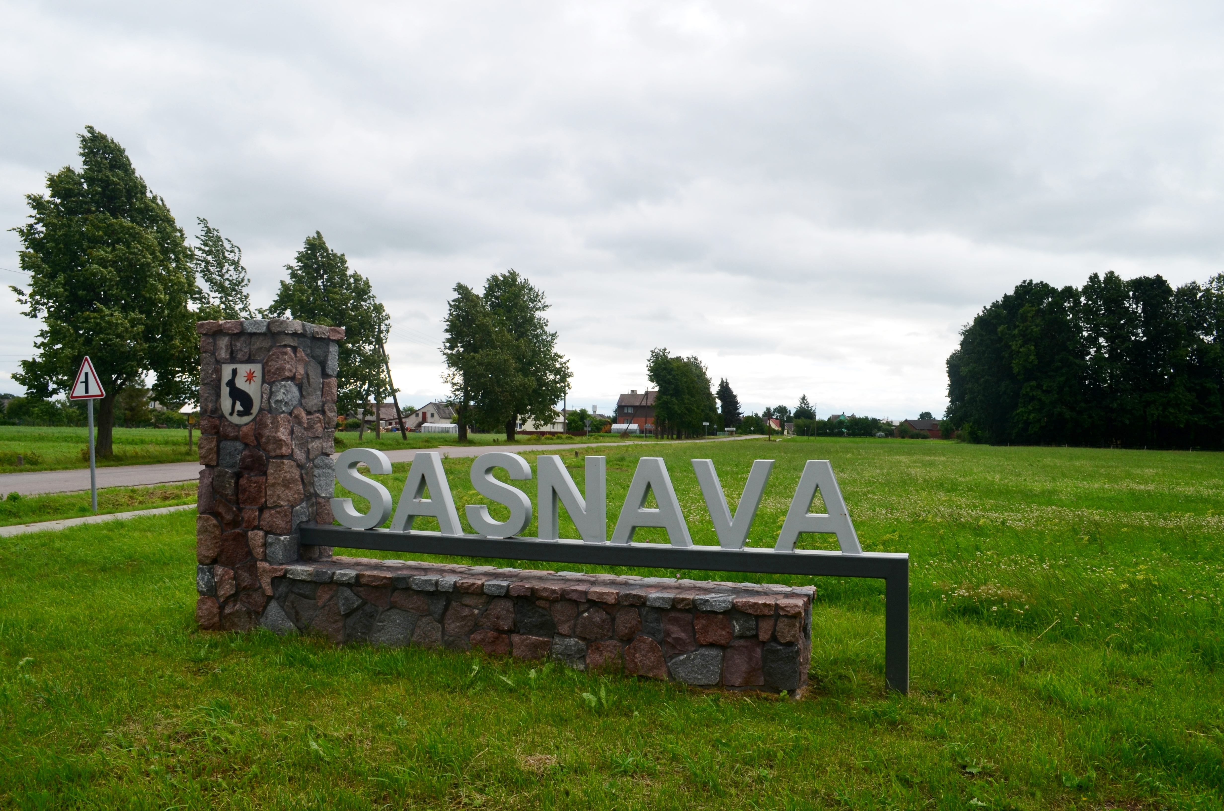 Ženklas įvažiuojant į Sasnavą, Marijampolės sav.